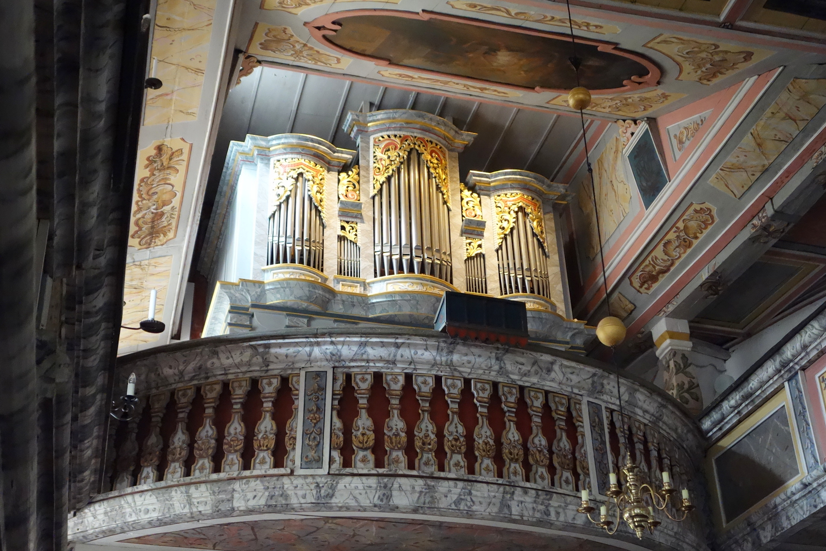 Orgel der Bergkirche Oybin, Sachsen, Deutschland